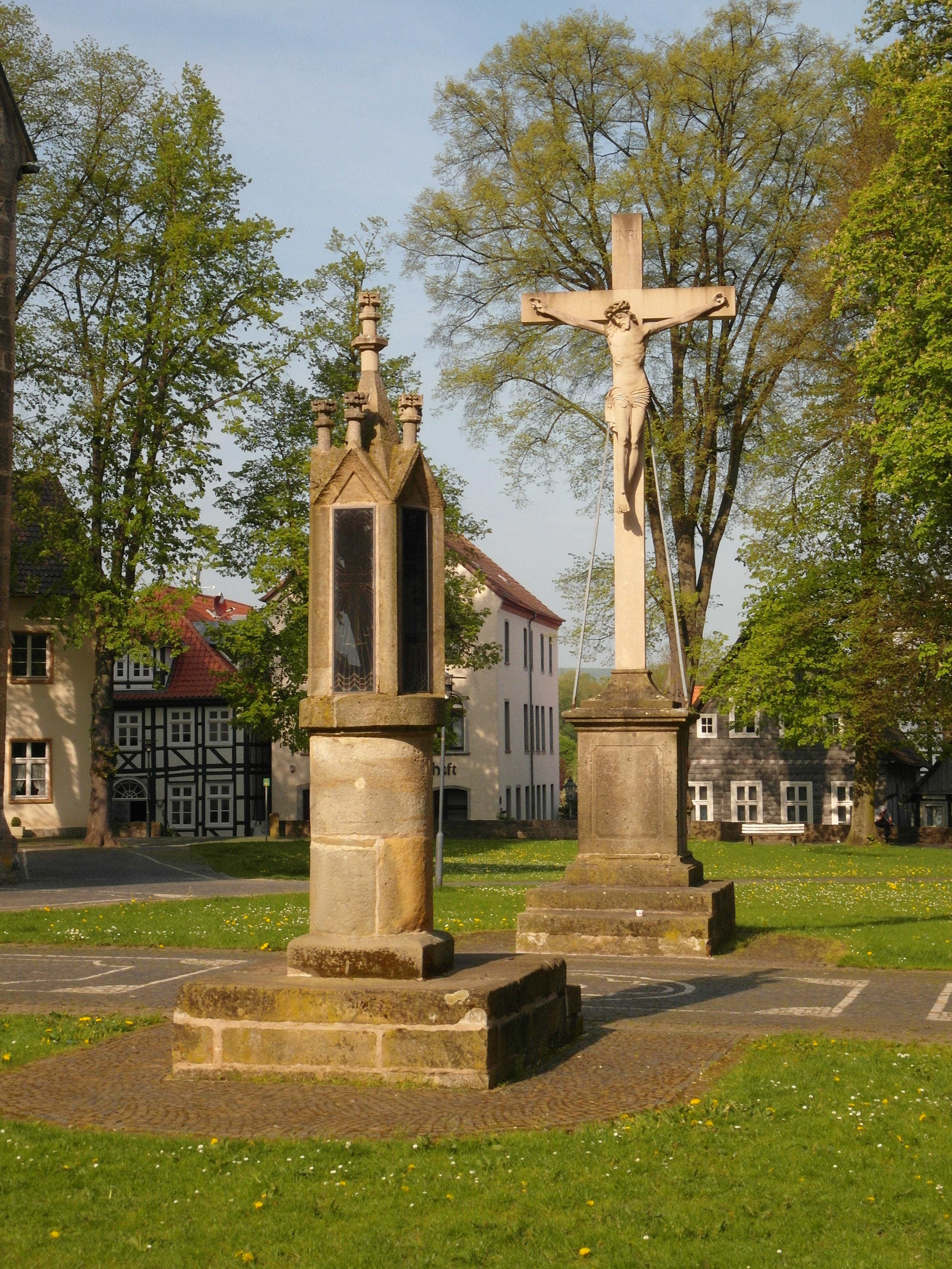 Dieses Foto zeigt Steinlampe und -kreuz vor der kath. Stadtpfarrkirche Brakel. This is a photograph of an architectural monument.